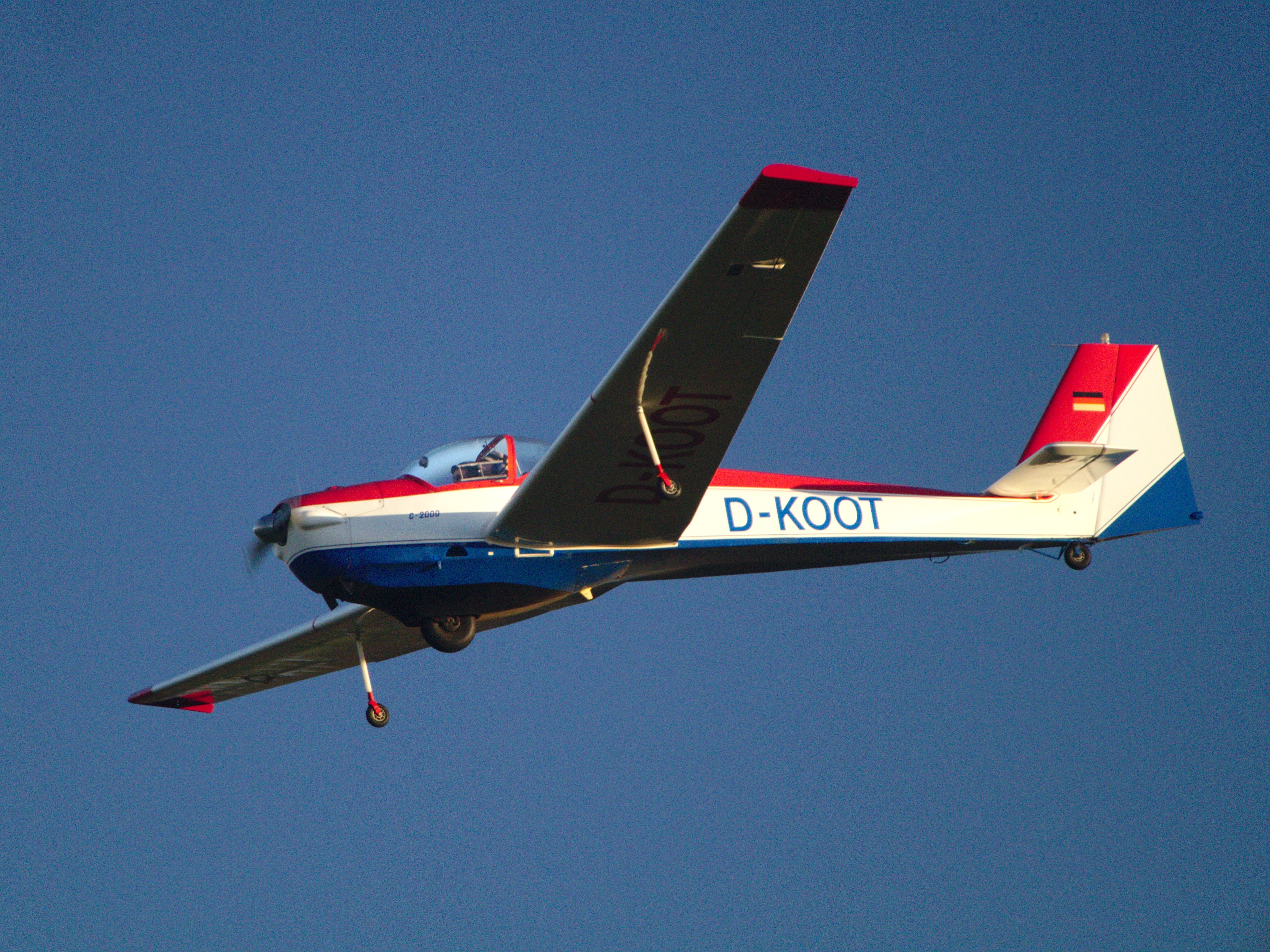 Ausbildungsflug mit einem doppelsitzigen Scheibe "C-Falken" auf dem Segelfluggelände Kammermark